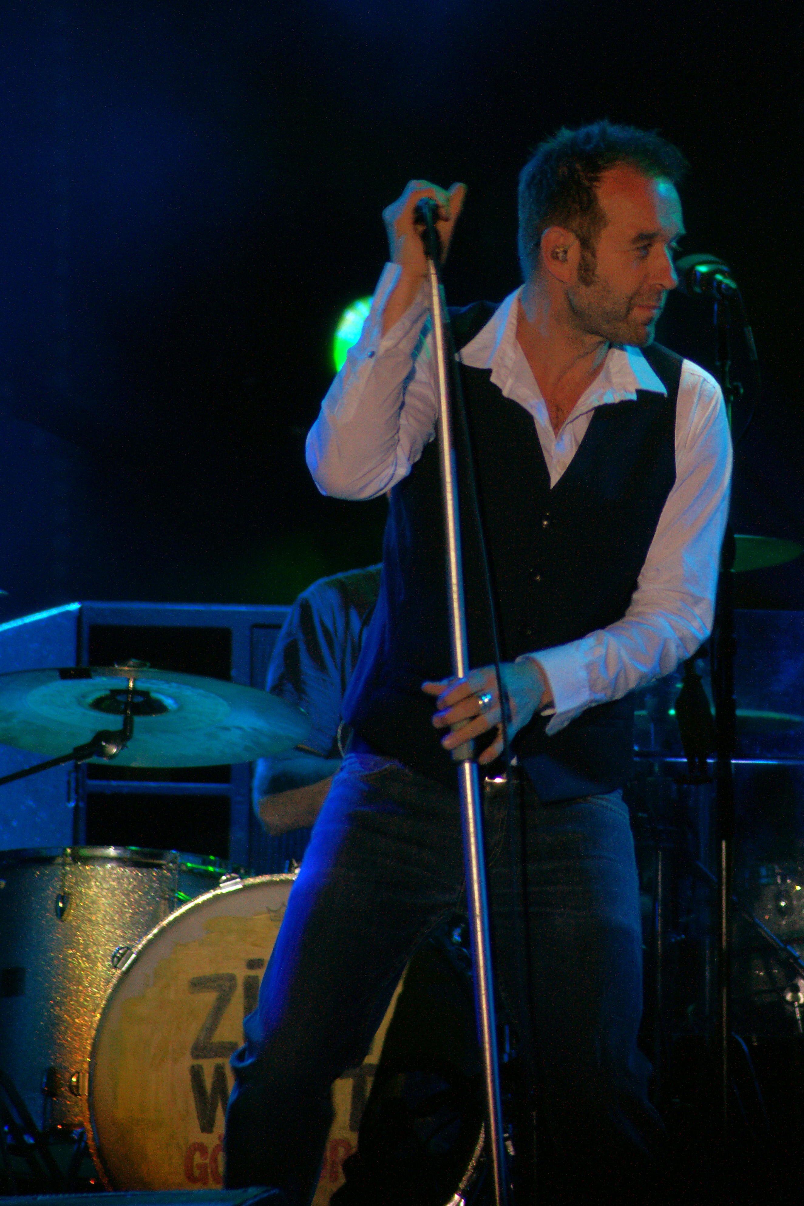 Kuno Lauener, Frontmann der Schweizer Rockband Züri West, am "Stars of Sounds"-Konzert in Aarberg, 1. Juni 2012.